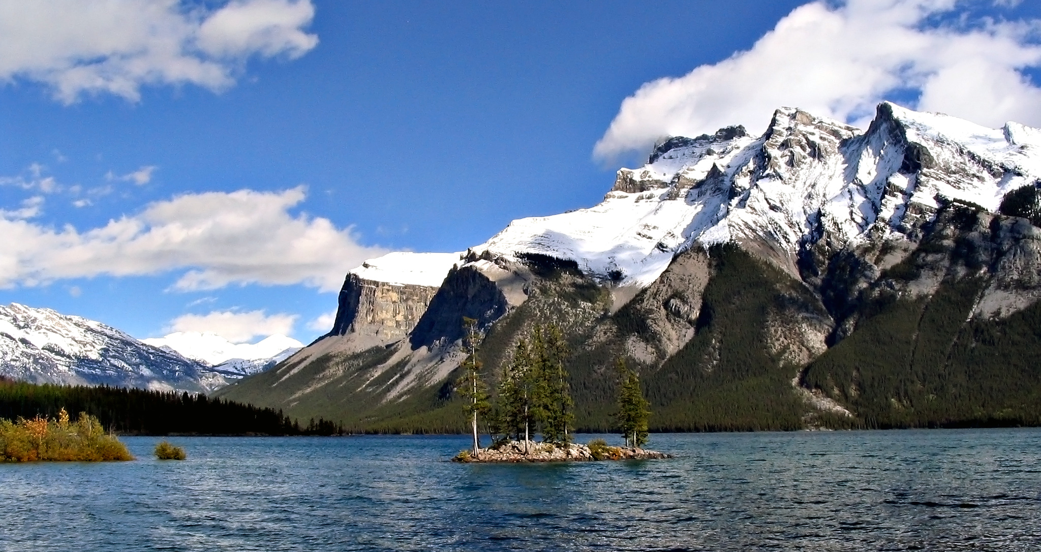 Lake Minnewanka, Banff National Park, Canada